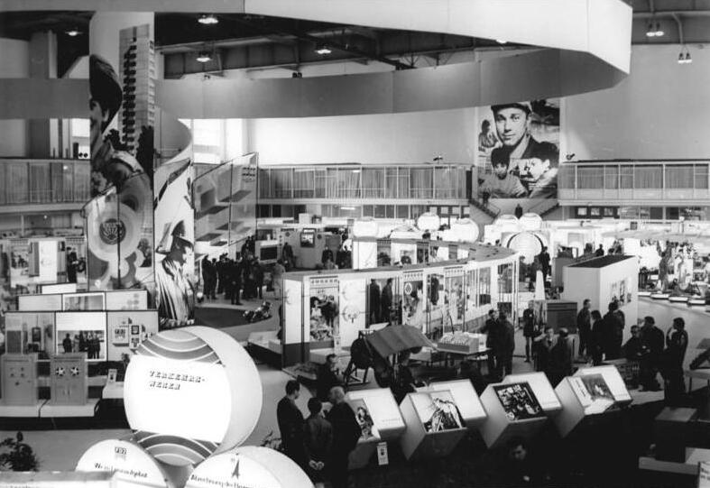 Leipzig, Messe der Meister von Morgen Zentralbild Koch-10.11.70 Leipzig: XIII. MMM- Blick in die Messehalle 1; auf der XIII. Zentralen Messer der Meister von morgen zeigen die besten Kollektive aus allen Bereichen, wie sie ihre Initiative vor allem auf die Schwerpunktaufgaben der Volkswirtschaft legen. Die XIII. MMM dient nicht nur dem Erfahrungsaustausch der jungen Neuererkollektive sondern trägt den Charakter einer wissenschaftlich-technischen Lehrschau.